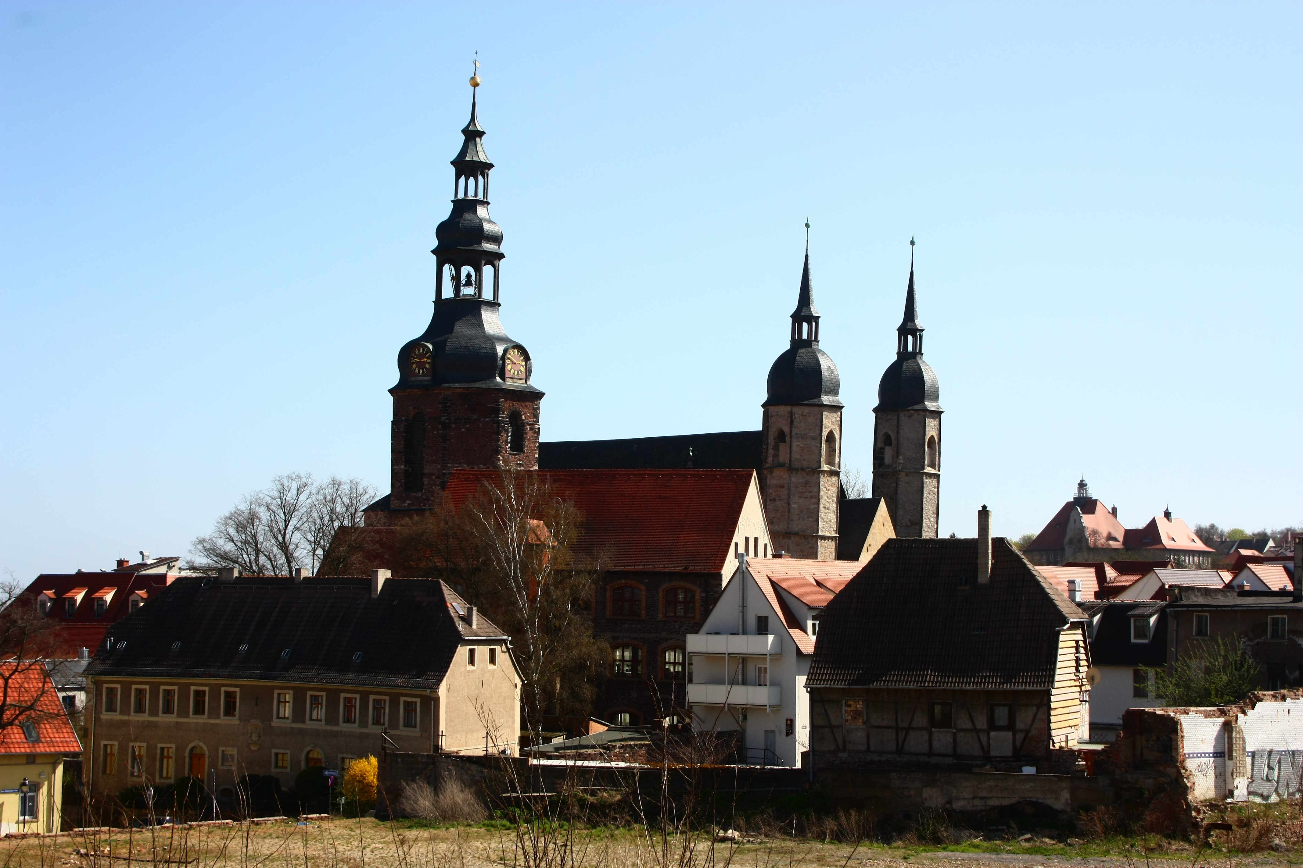 Blick vom Kreisverkehr am Ende der Nußbreite auf die St.Andreaskirche in Eisleben